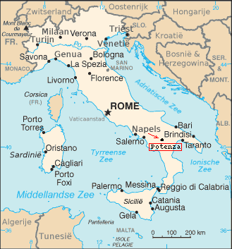 Oorspronkelijk uit CIA Factbook; vertaald in Nederlands door Danielm; omgezet in PNG door BenTels, enkel plaatsnaam met rood gemarkeerd door mij; Public Domain